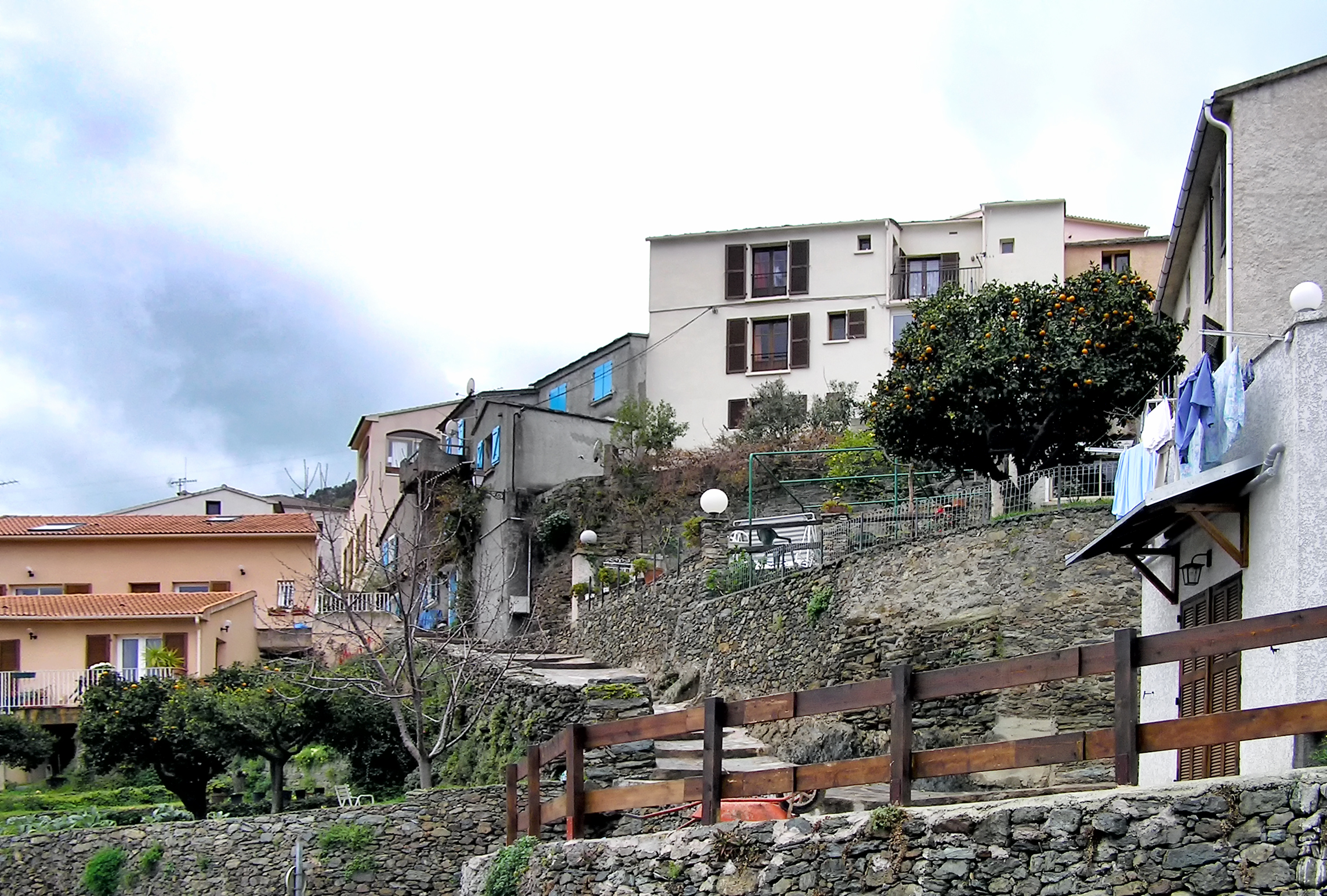 Biguglia, agglomération bastiaise (Haute-Corse) - Quartier au sud du village